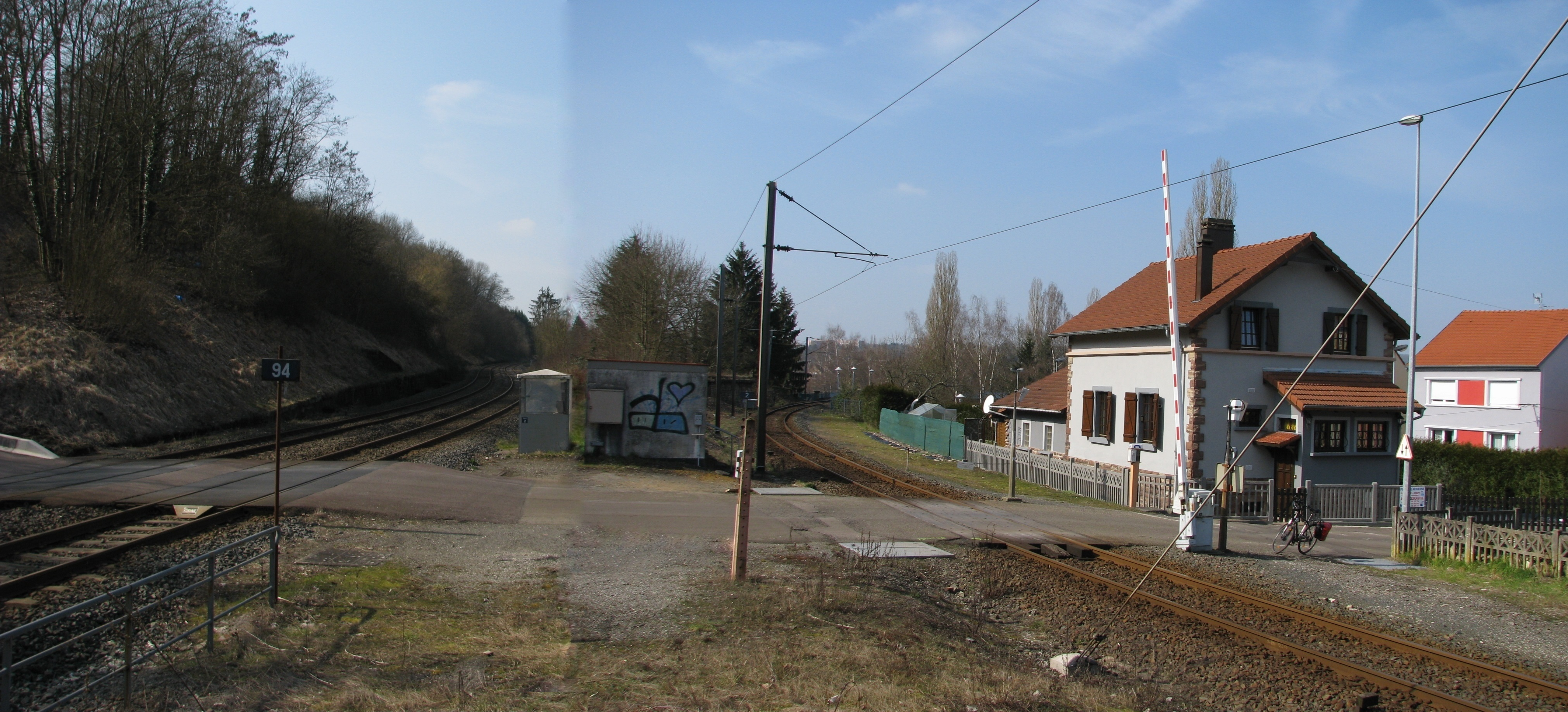 Die Ausfahrt hinter dem Bahnhof und dem Tunnel in Saargemünd in Richtungen Béning und weiter nach Metz/ Thionville (links) und Saarbrücken (rechts).